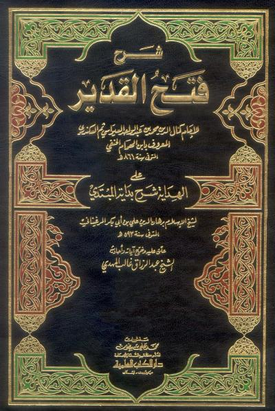 ফিকাহ গ্রন্থ